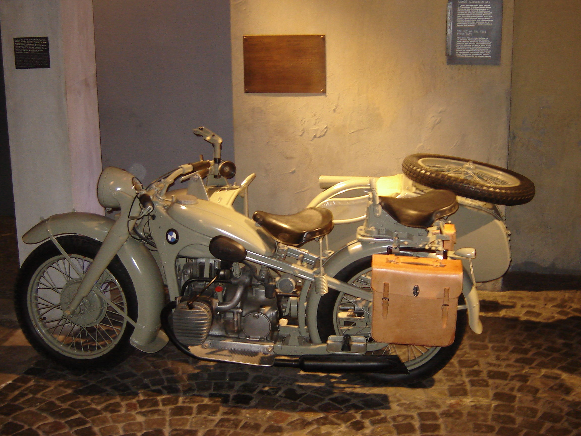 Motocykl BMW wystawiony w Muzeum Powstania Warszawskiego